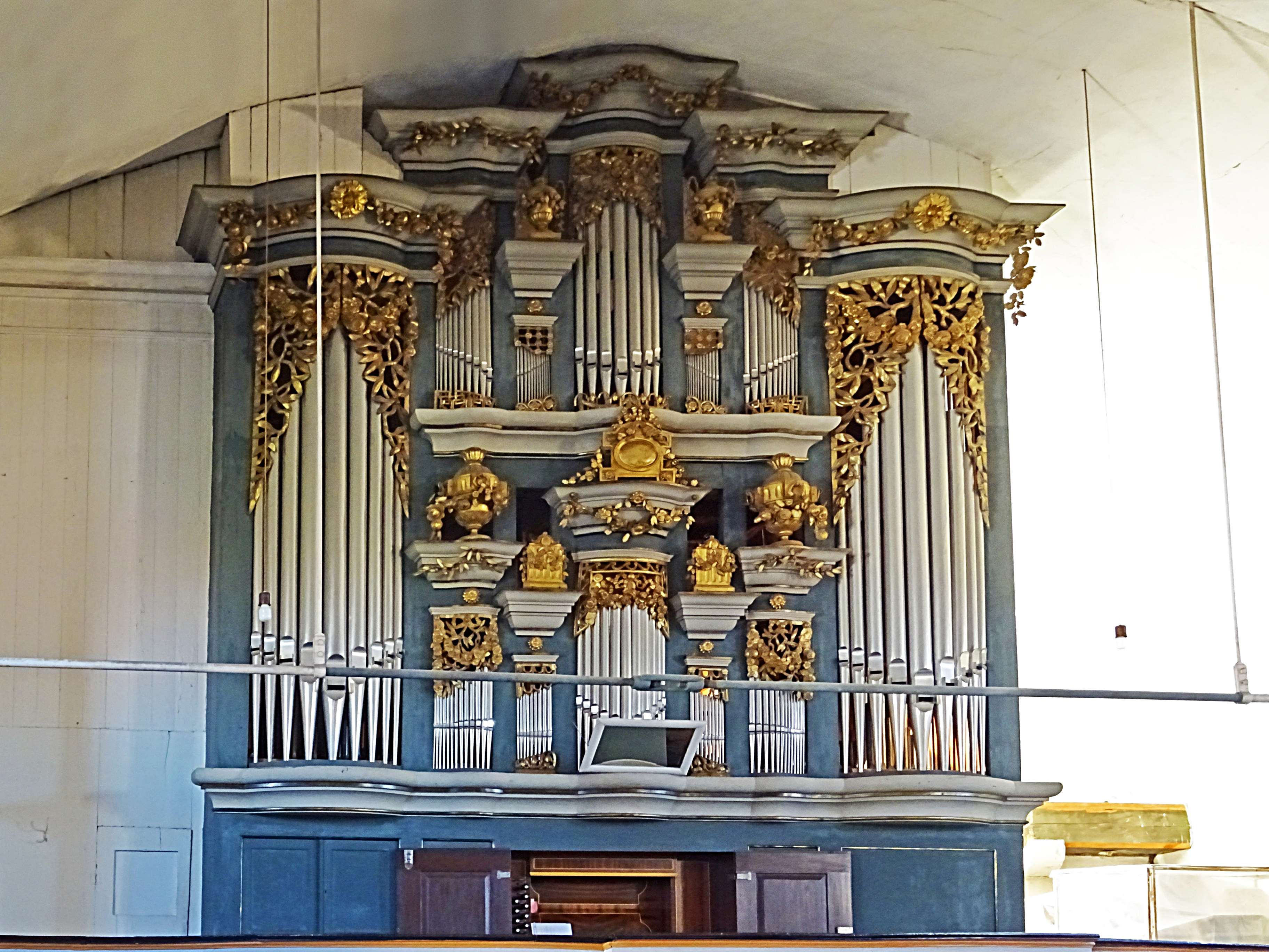 Orgel im historischen Prospekt von J.C. Kummer aus Dachwig (1787) in der Andreaskirche (Erfurt), Umbau durch die Fa. Voigt aus Bad Liebenwerda unter Erhaltung der alten Substanz (1989 IIP/25)[1]